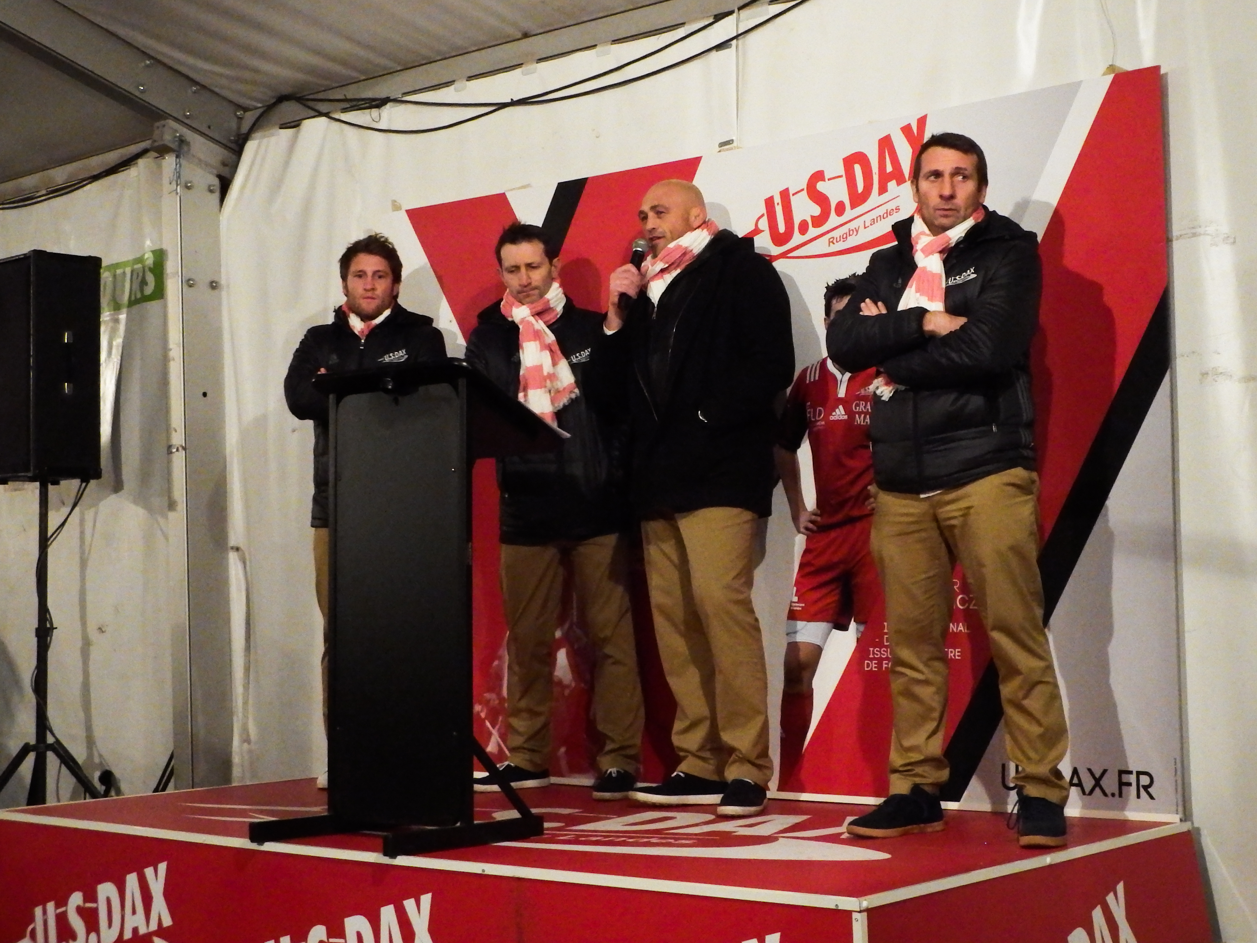 Voeux de l'US Dax après le Nouvel An 2017.